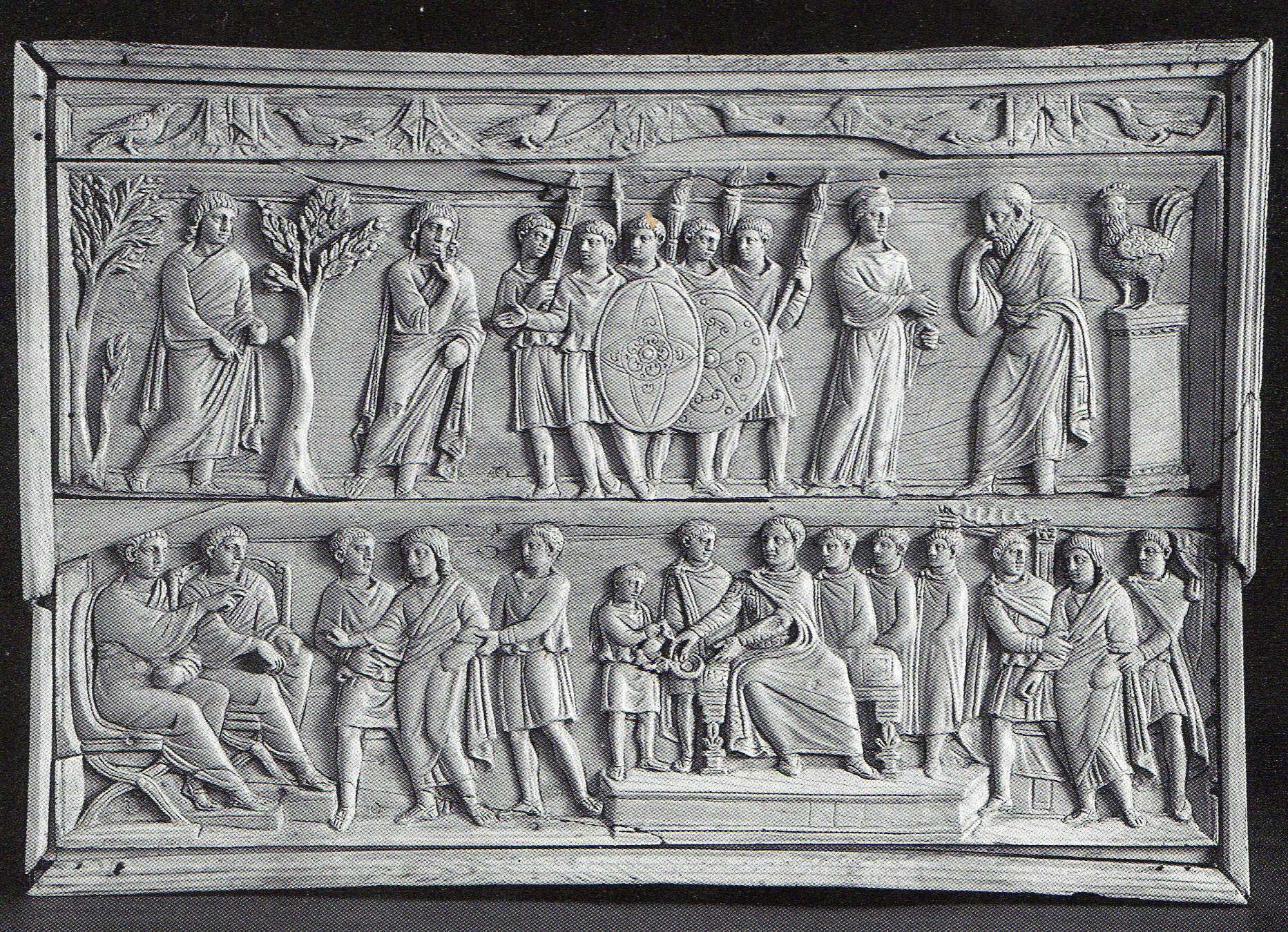 Lipsanoteca di Brescia (coperchio)